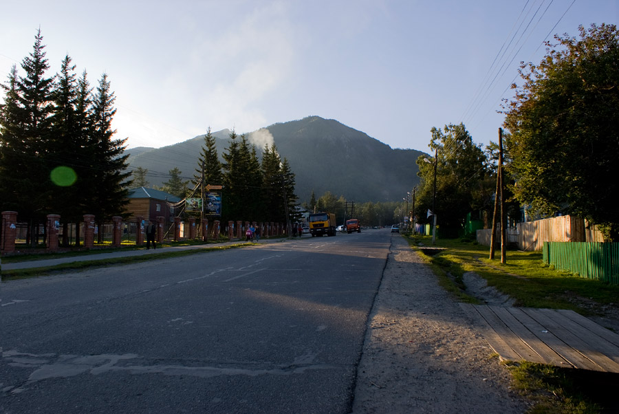 Главная улица поселка Аршан